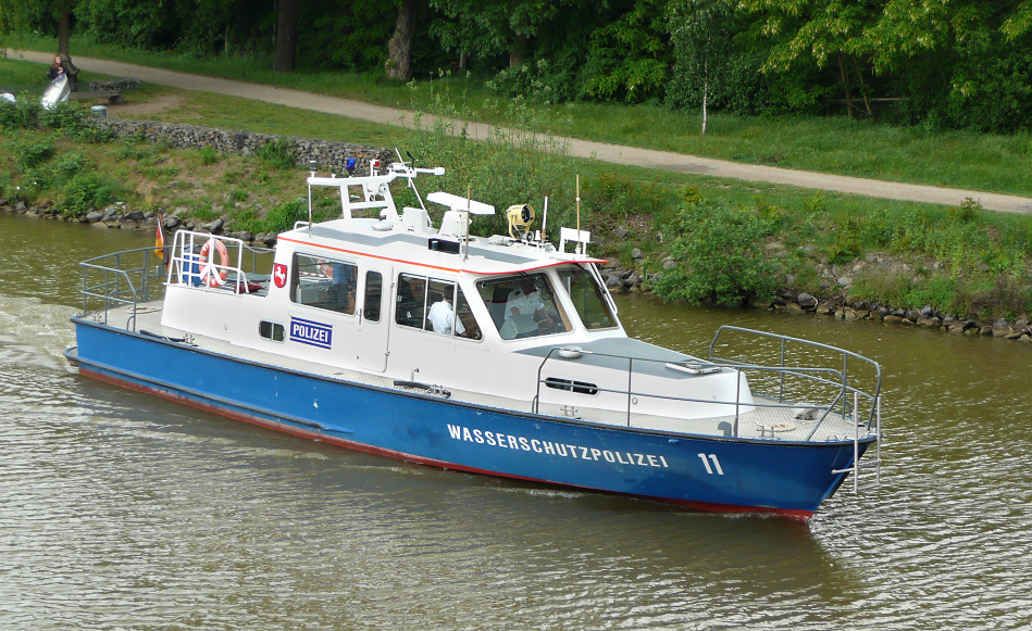 Wasserschutzpolizeiboot Hannover